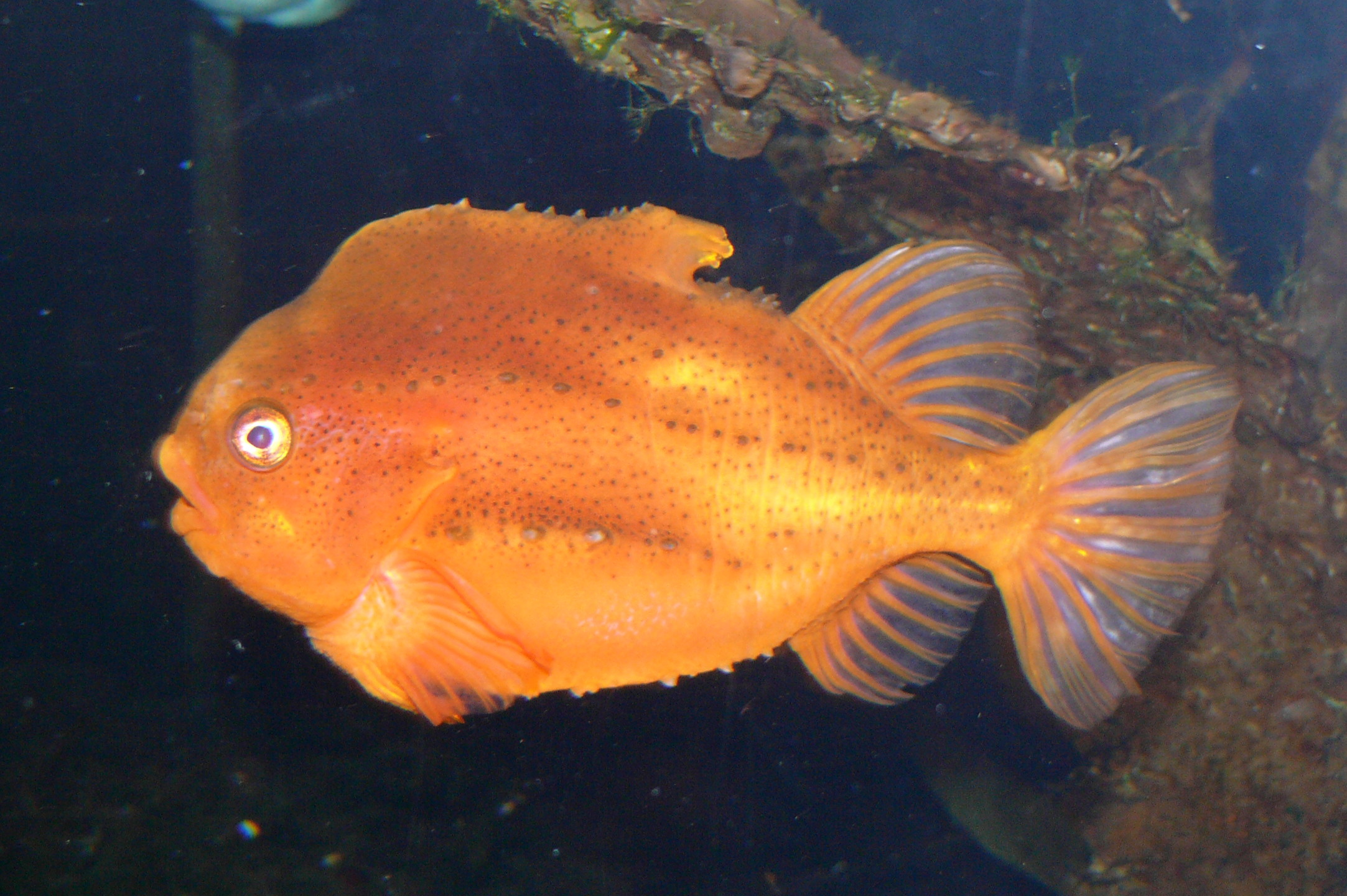 Seehase (Cyclopterus lumpus)